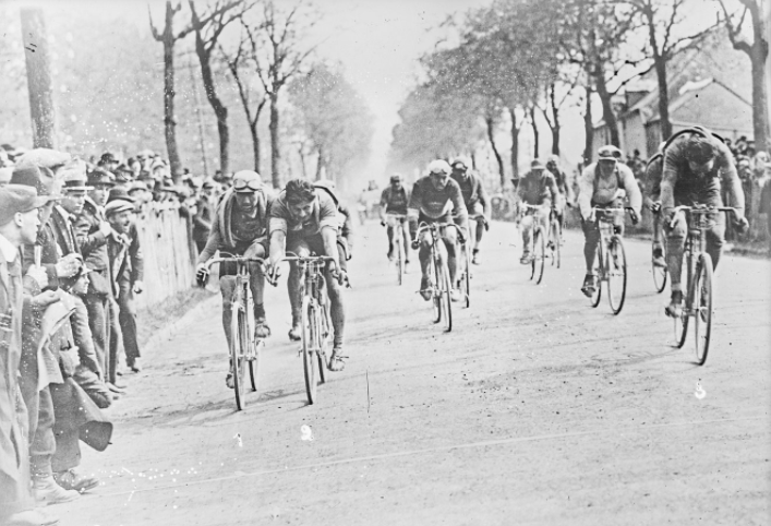 Arrivée au sprint de Paris-Tours 1922, 1-Henri Pélissier, 2- Henri Suter, 3-Robert Jacquinot.